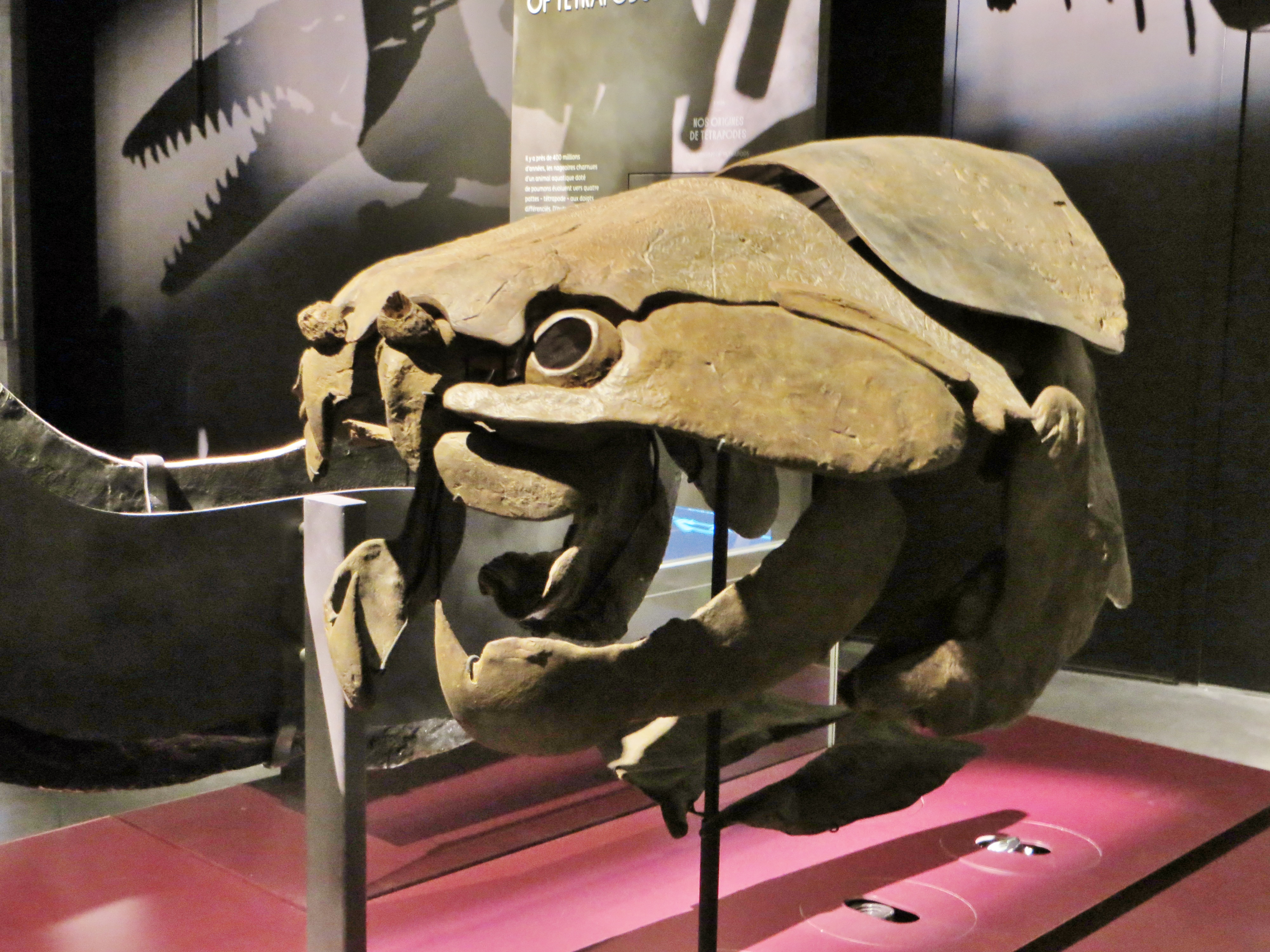 Fossil - Took the picture at Musee des Confluences, Lyon